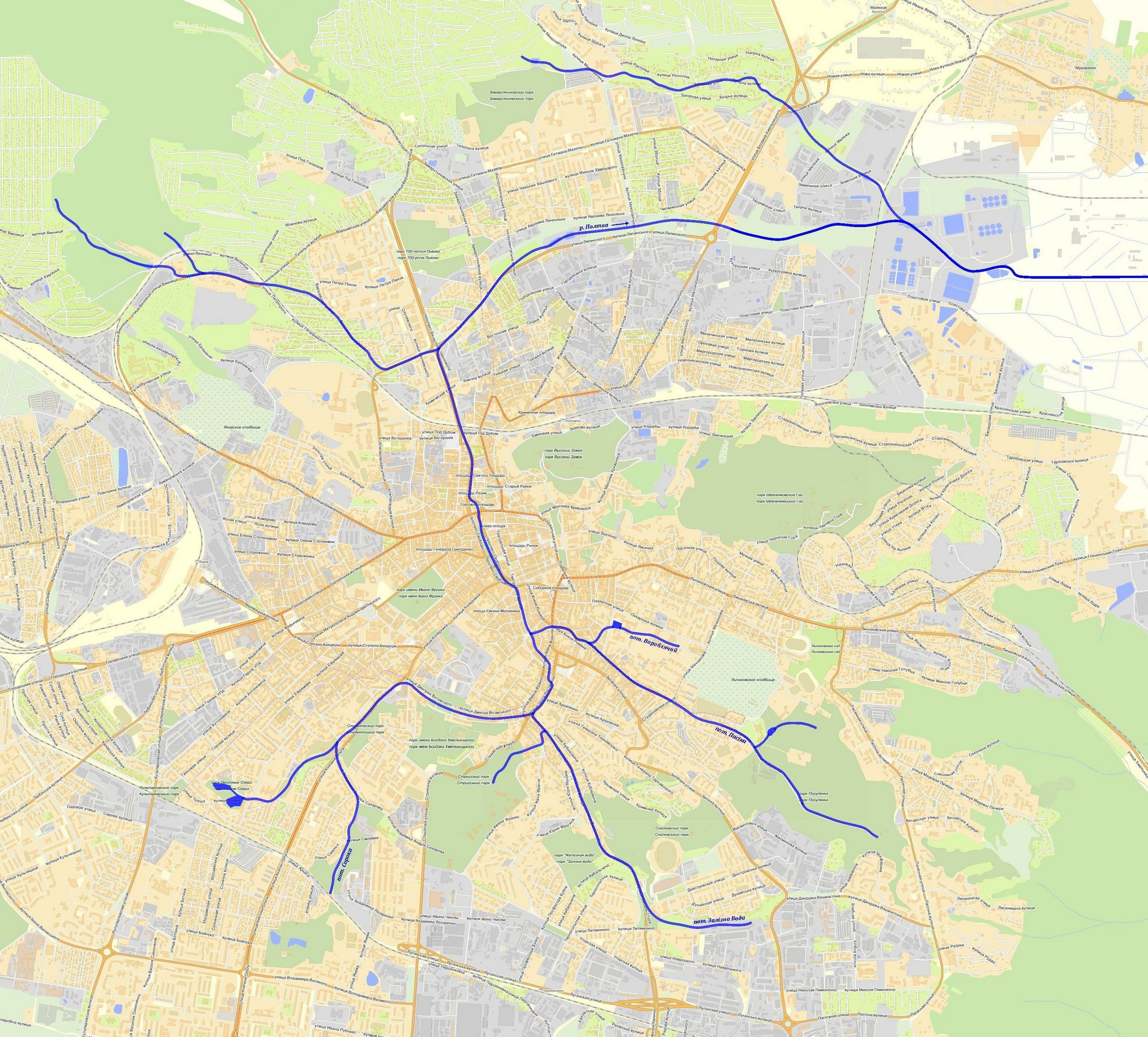 Mapa Pełtwi